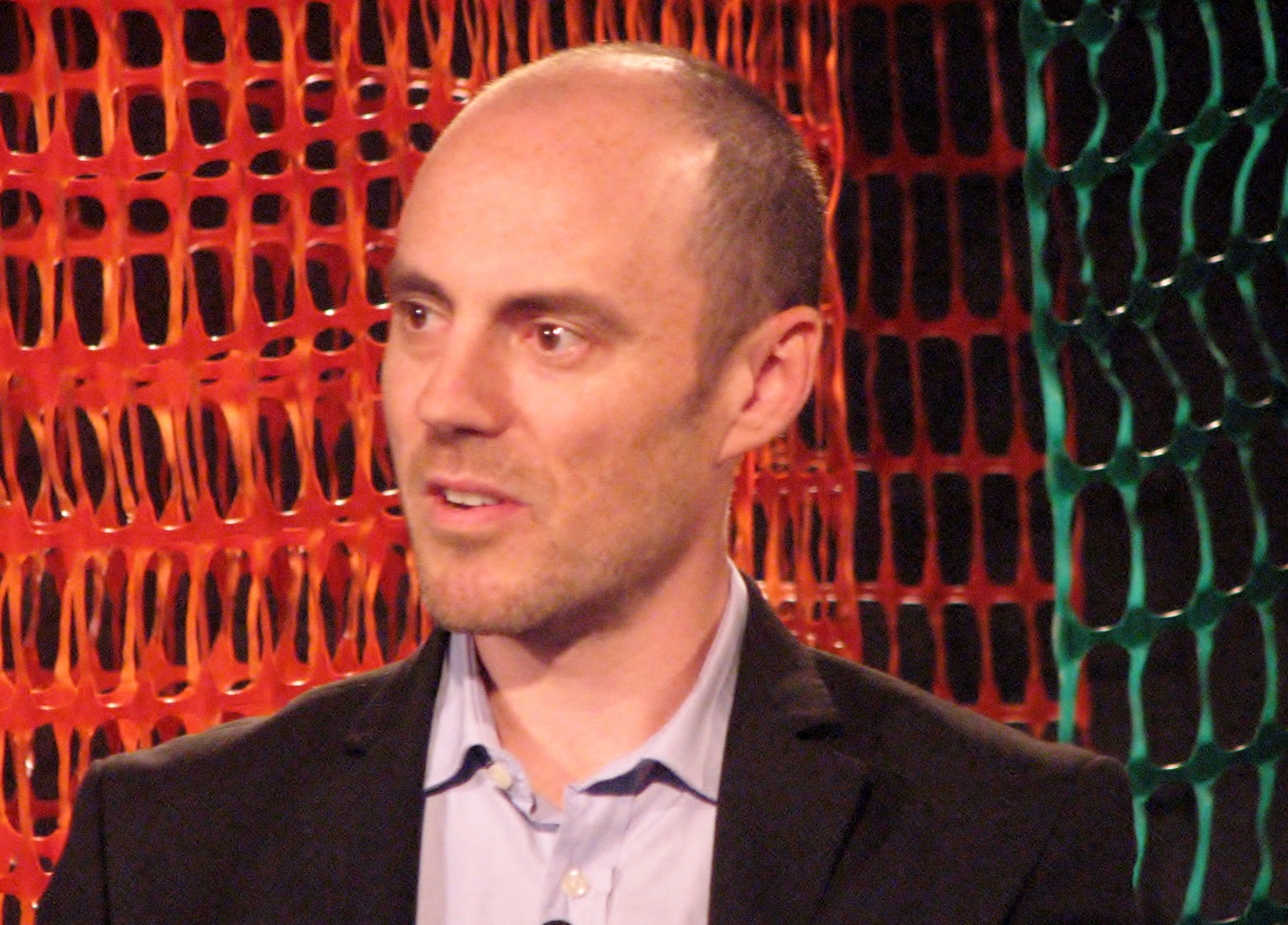 Keith Lowe esinemas kirjandusfestivalil HeadRead Kirjanike Maja musta laega saalis